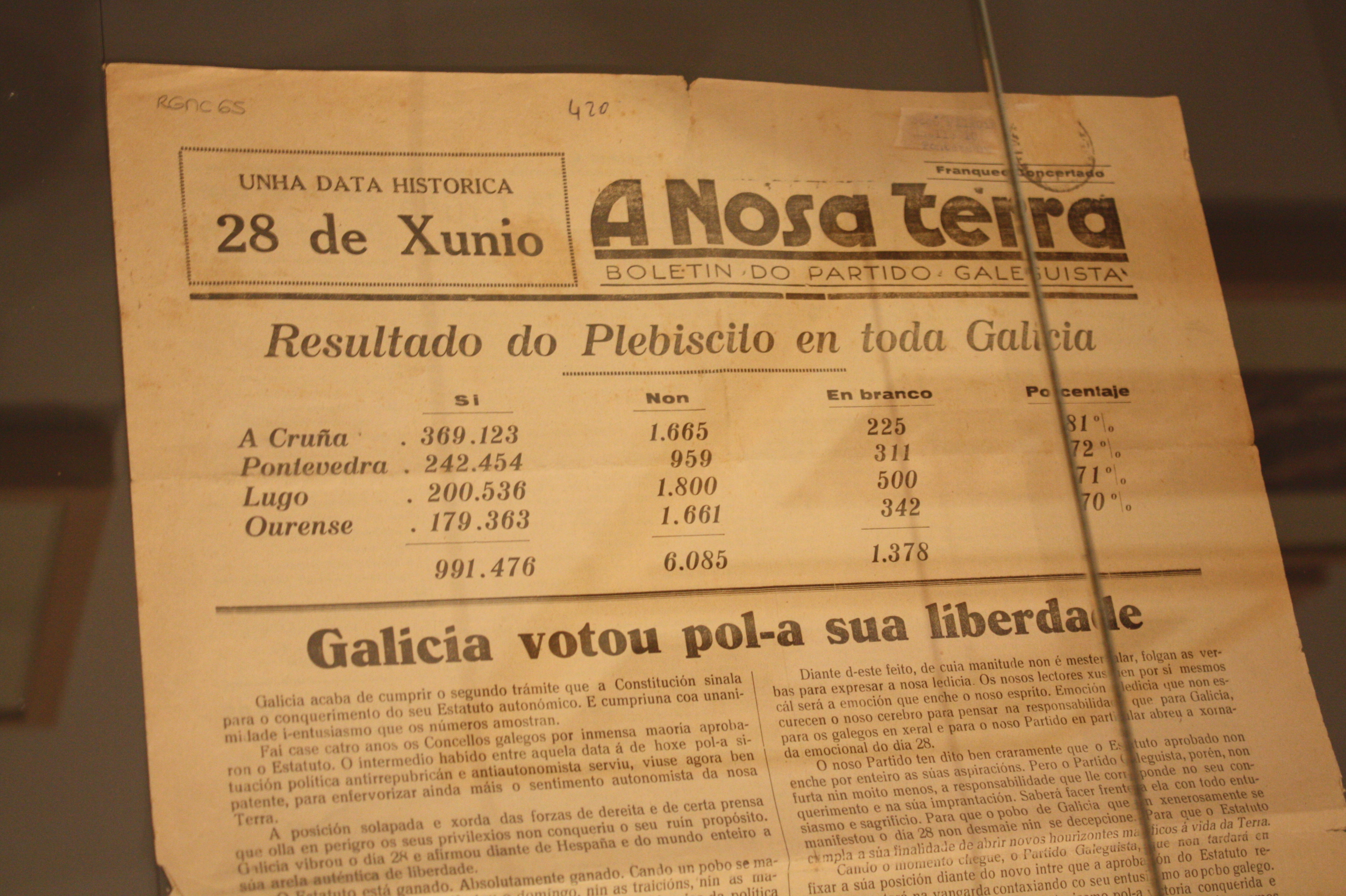 Portada d'A Nosa Terra, publicando os resultados do plebiscito en Galicia do 28 de xuño de 1936